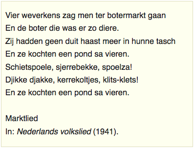 Tekst volksliedje 'Vier weverkens zag men ter botermarkt gaan' (oudste vindplaats: 1879). Opgenomen in het liedboek "Nederlands volkslied", samengesteld door Pollmann en Tiggers (1941).